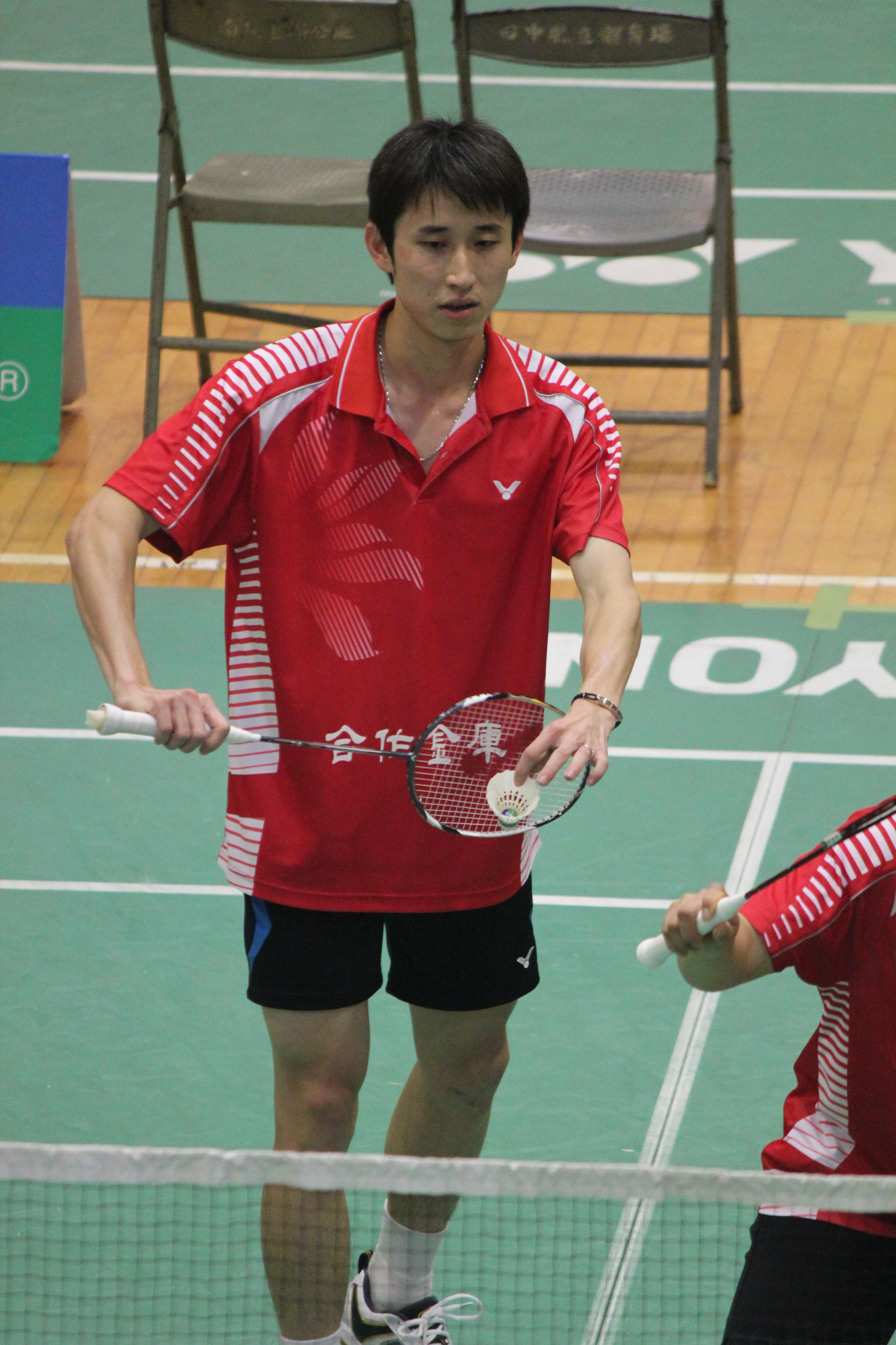 中文（台灣）: 李勝木於2010全國總排名賽出賽